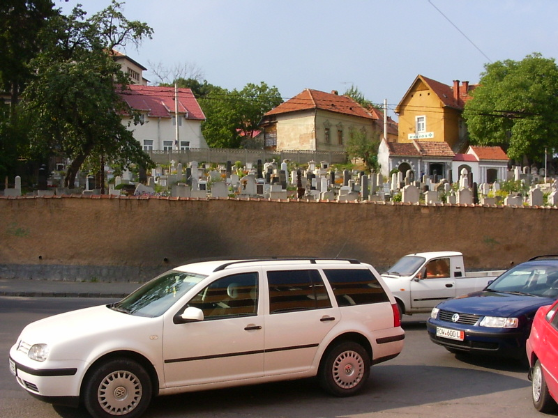 Magyar református temető Brassóban